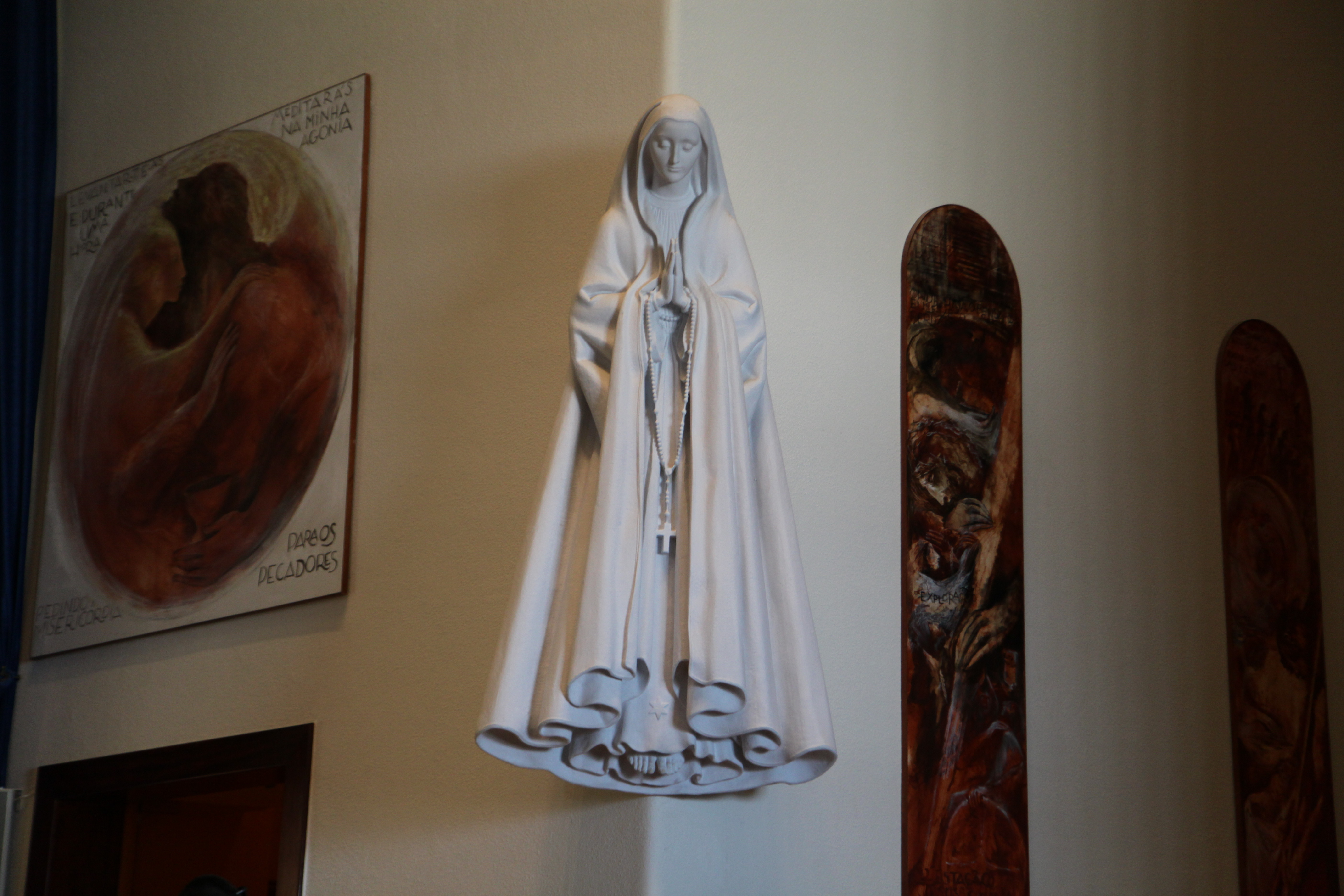 Lisbonne